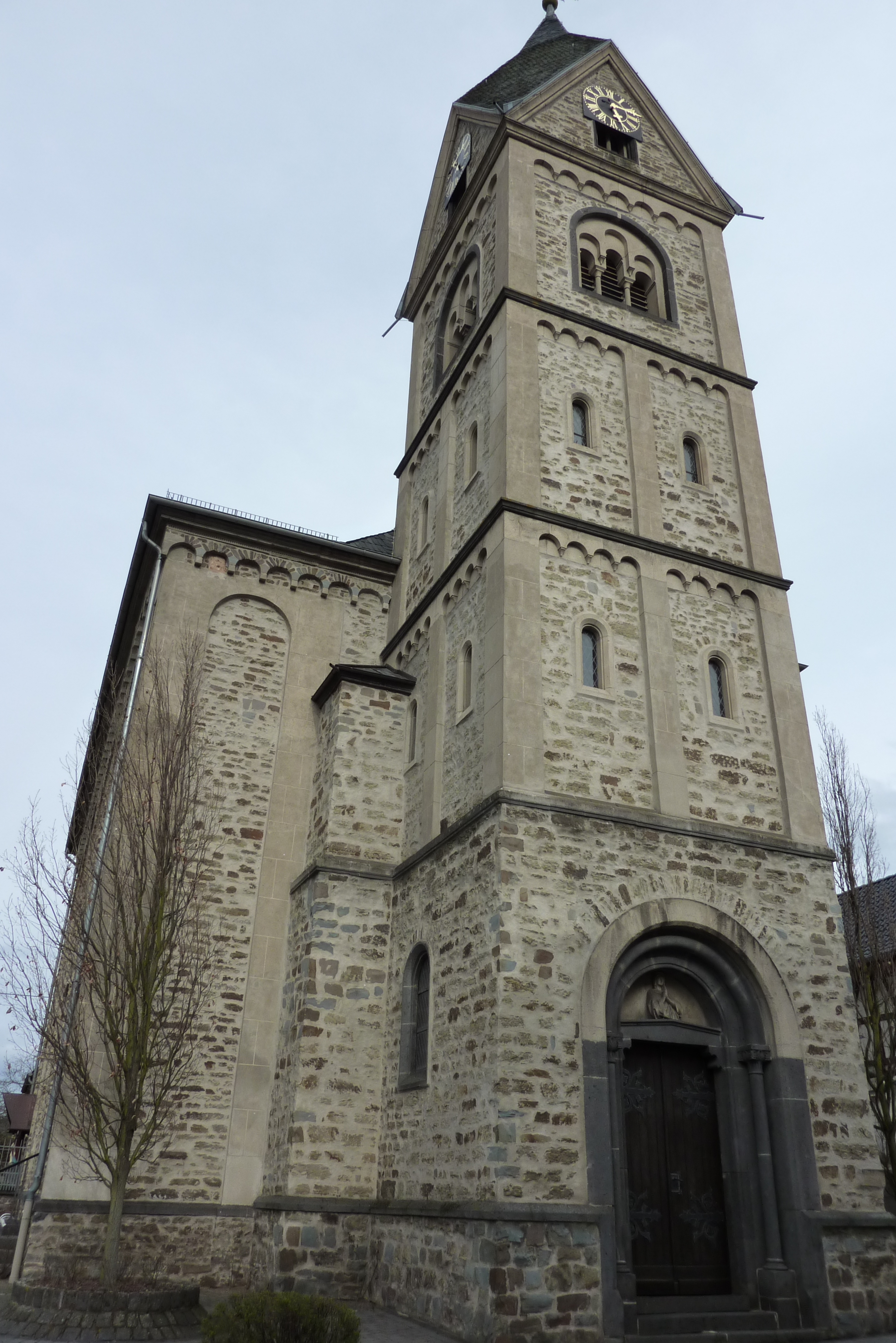 Turm und Portal der katholischen Pfarrkirche St. Peter in Westum